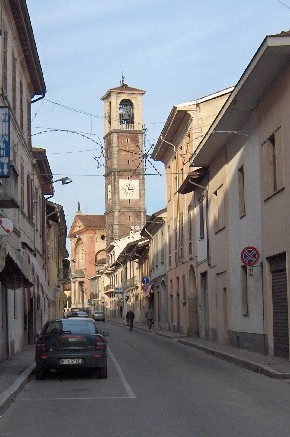 Via Roma a Lonate Pozzolo (VA), foto del gennaio 2006. L'autore Franco Maria Boschetto ha rilasciato questa foto nel pubblico dominio.